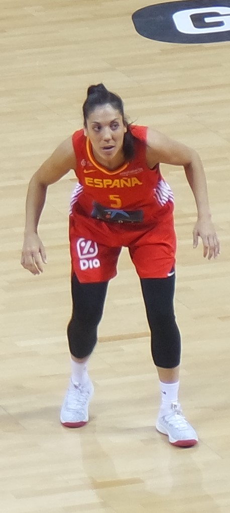 La jugadora de baloncesto aragonesa/española Cristina Ouviña.